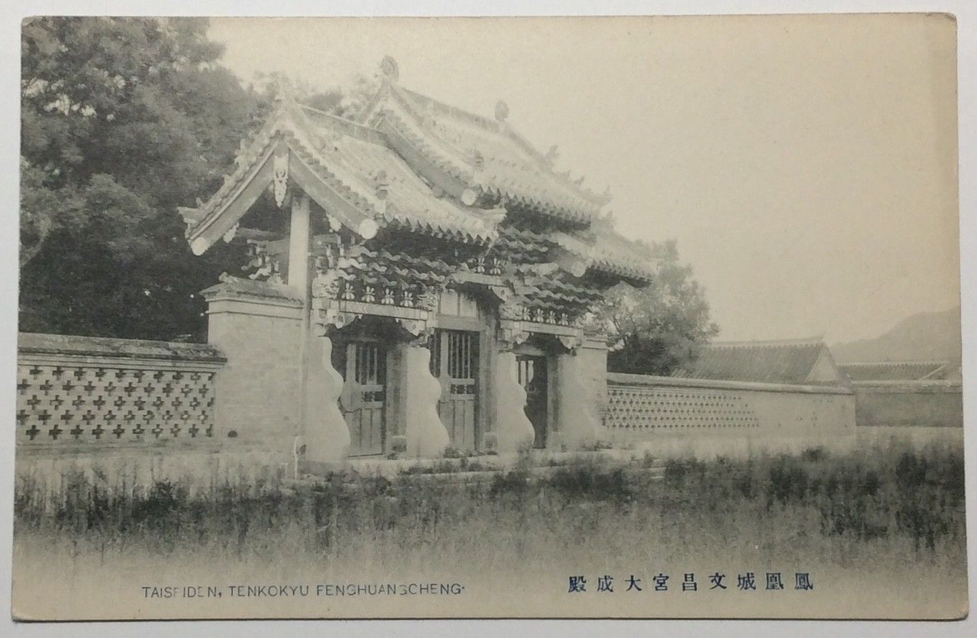 凤凰城文昌宫大成殿